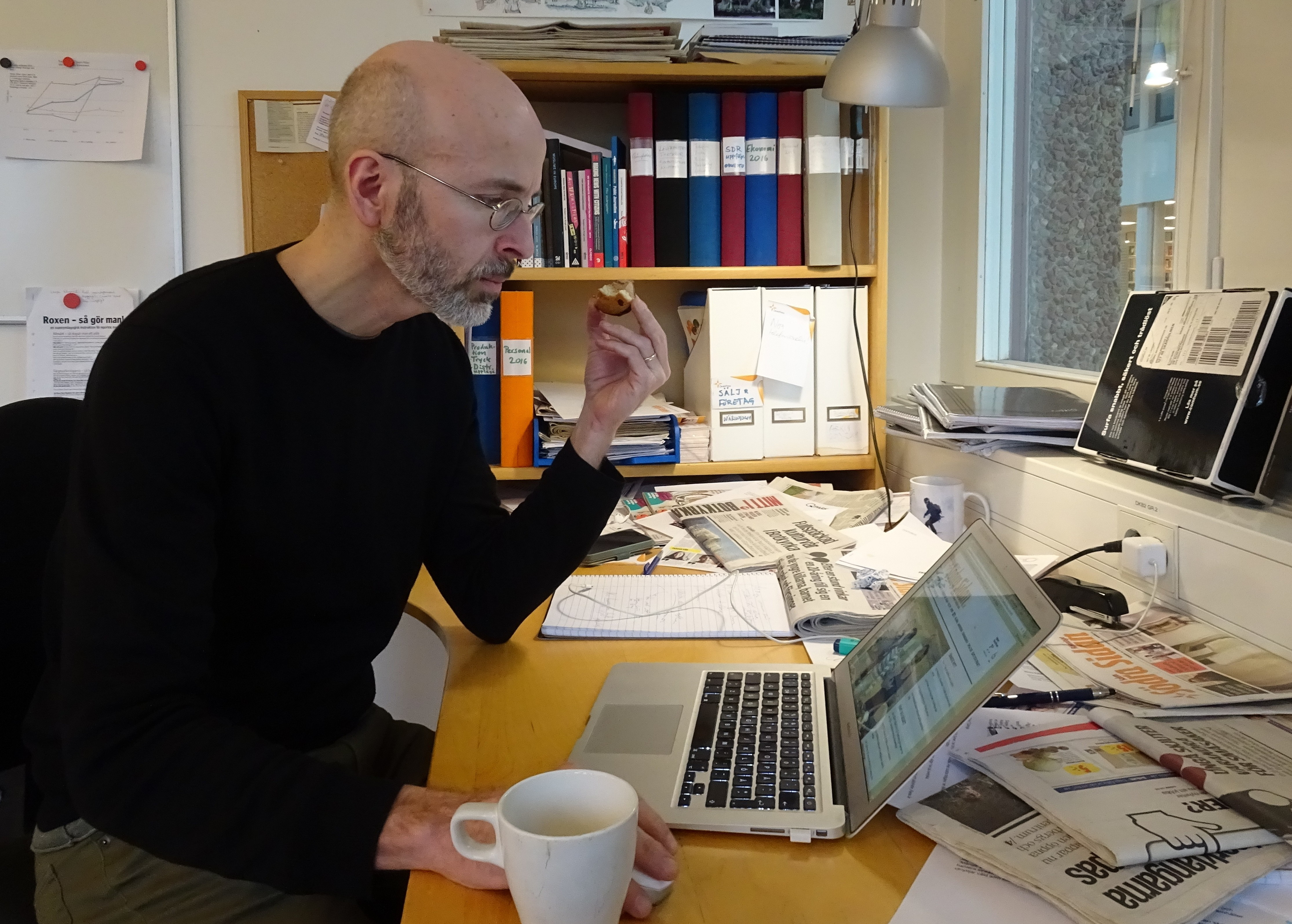 Södra Sidan, chefredaktör Petter Beckman